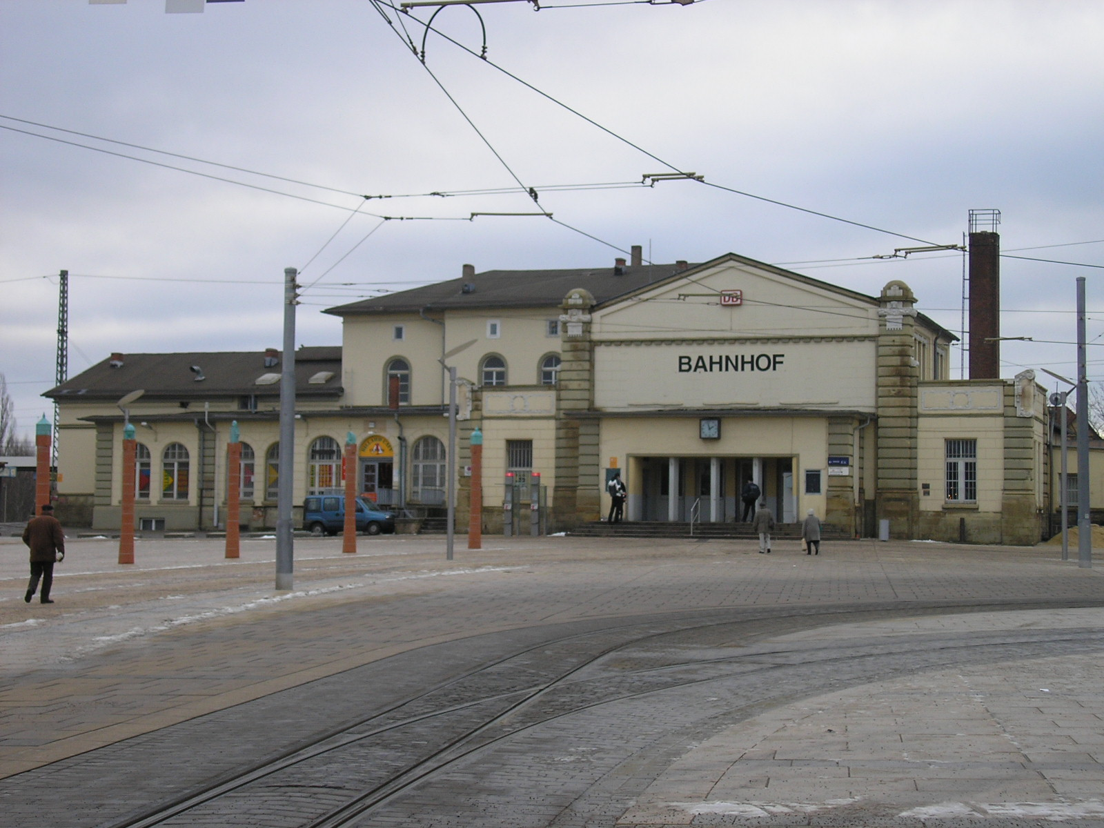 Der Bahnhof von Gotha (Thüringen).